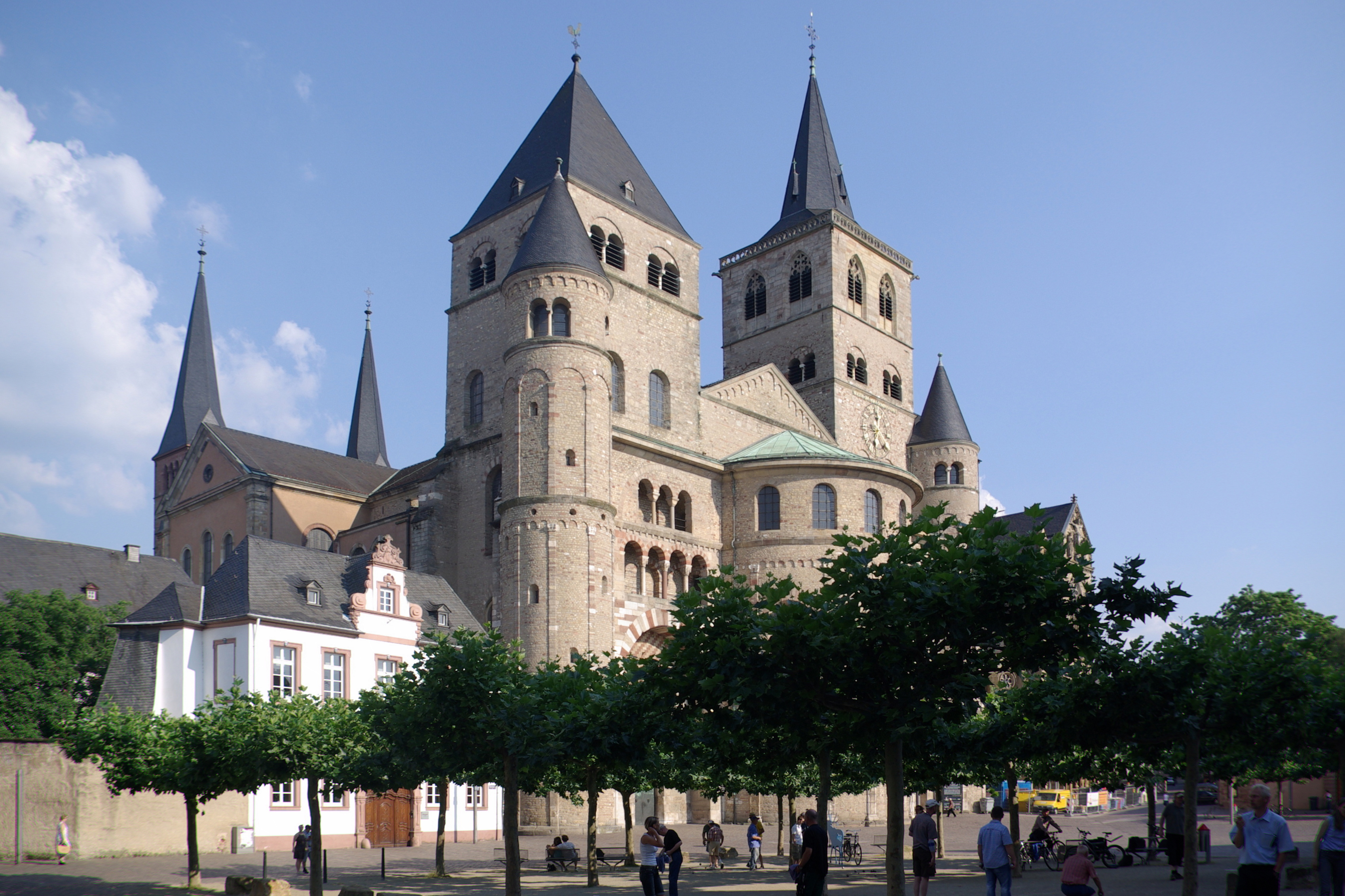 Trierer Dom